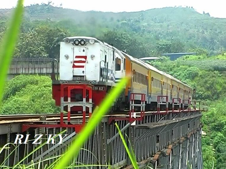 Le train "Serayu" franchissant le pont de Cikubang, Java occidental, Indonésie